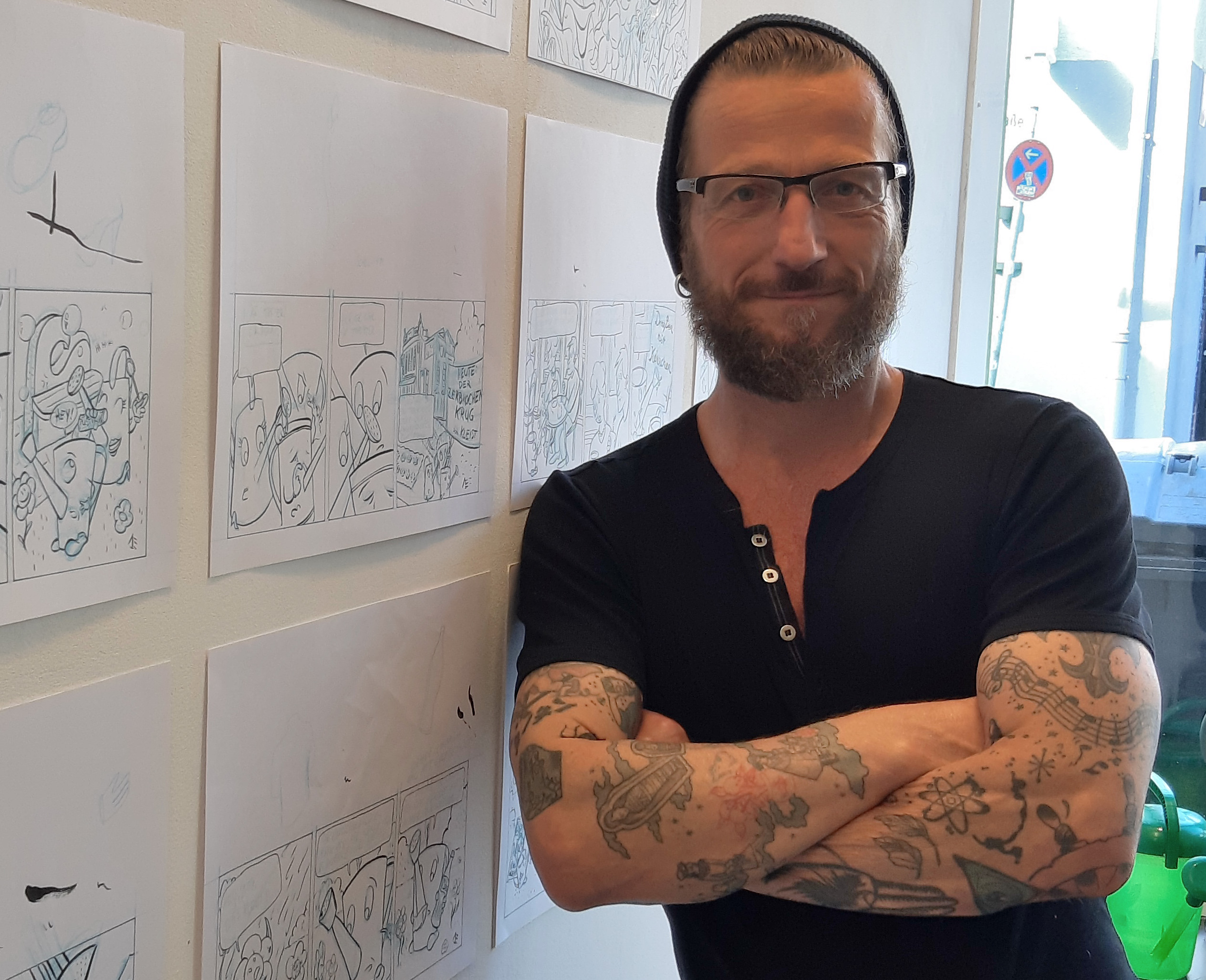 Andreas Eikenroth im Gießener Gießkannenmuseum